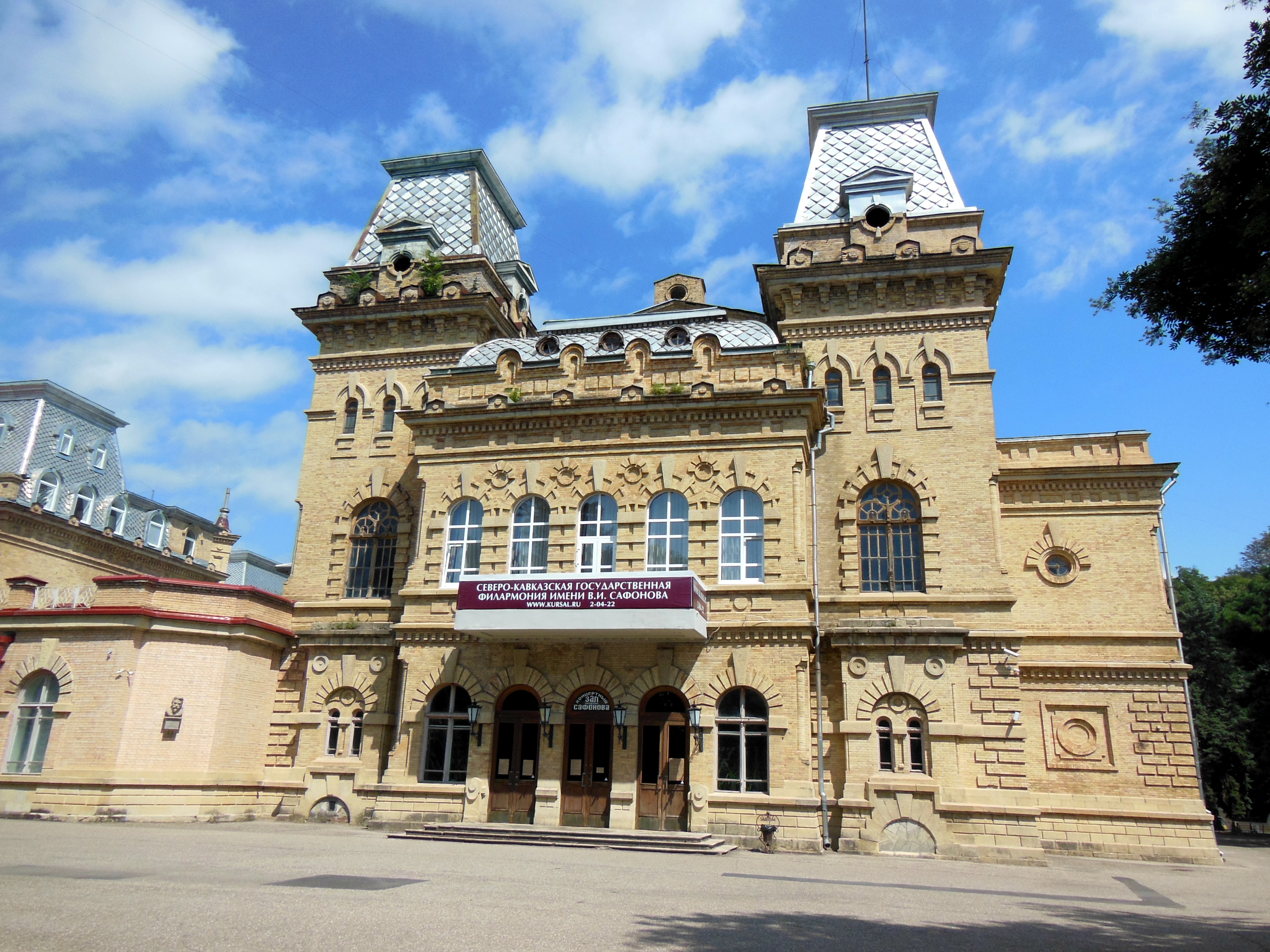 Курзал Общества Владикавказской железной дороги: улица Карла Маркса, 3А, Кисловодск, Ставропольский край